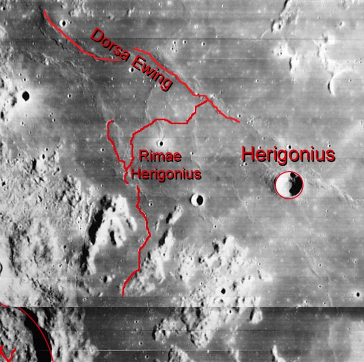 Rimae Herigonius (Imagen LPI)